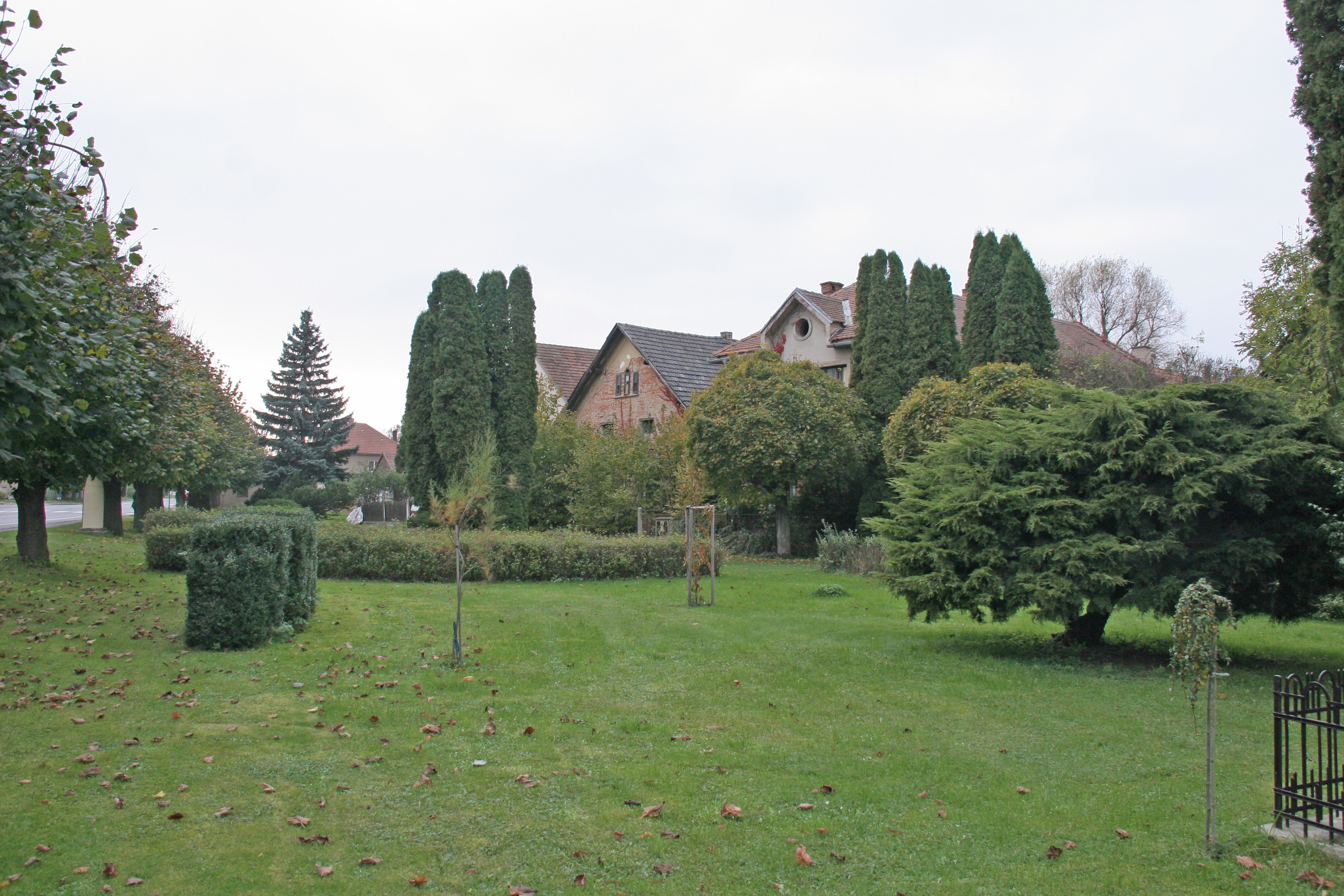 Ostrov náves